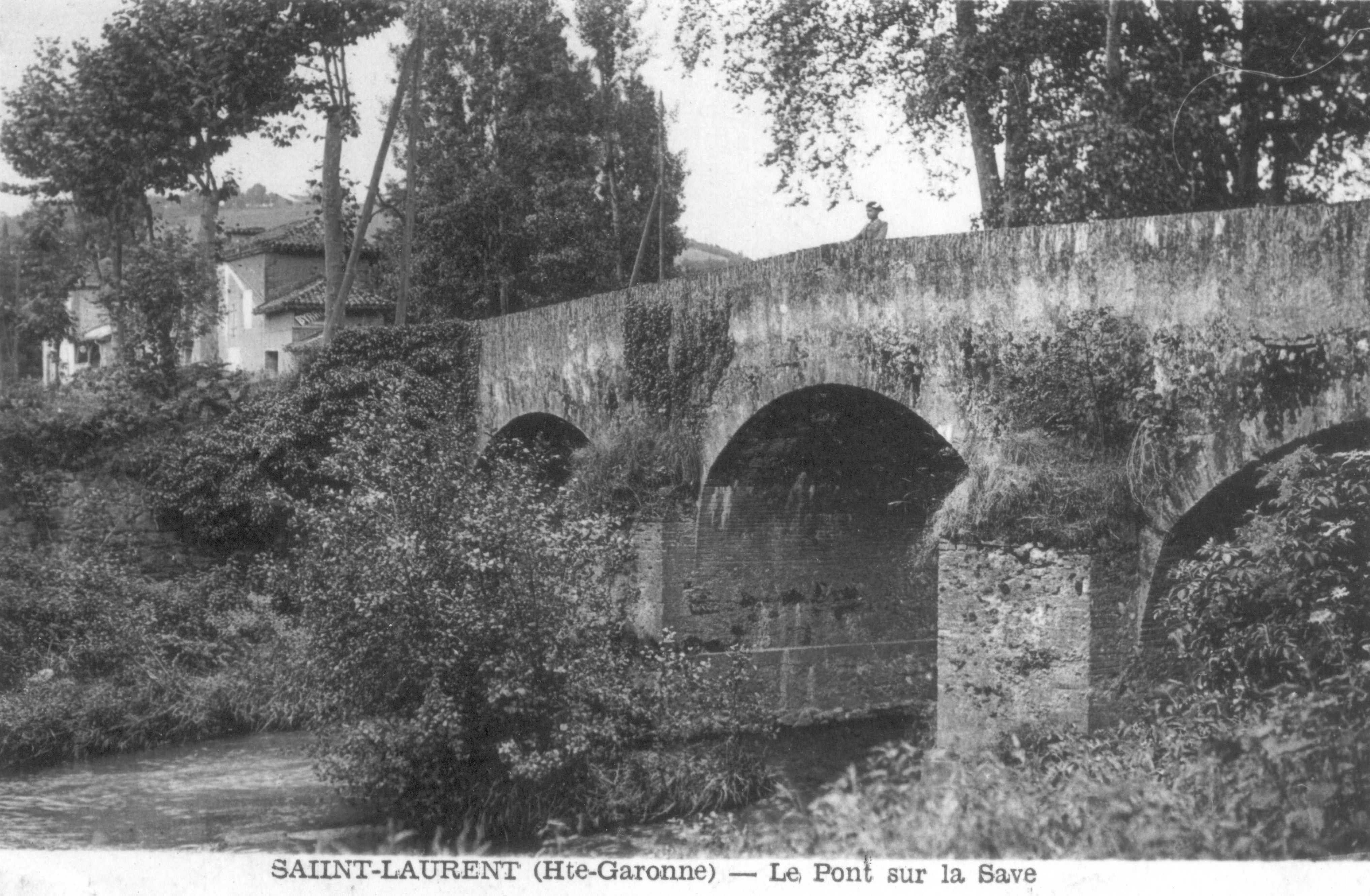 Carte postale du Pont de la Save à Saint-Laurent (Haute-Garonne).